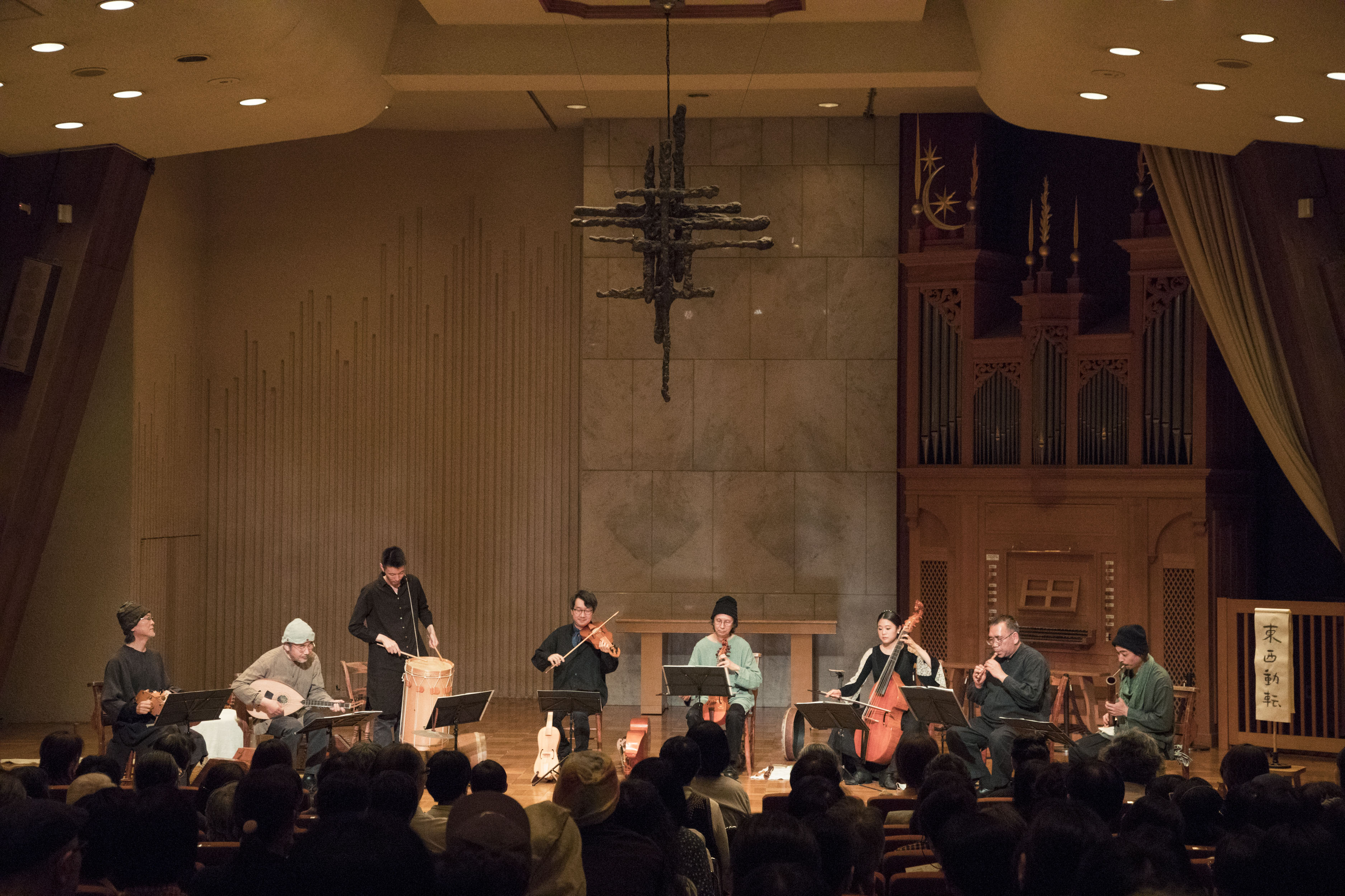 2018「中世ルネサンス音楽会」